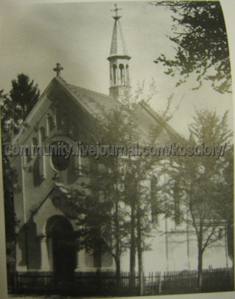 Костел Опіки Найсвятішої Панний Марії, с.Горпин, Стан перед 1939 р.